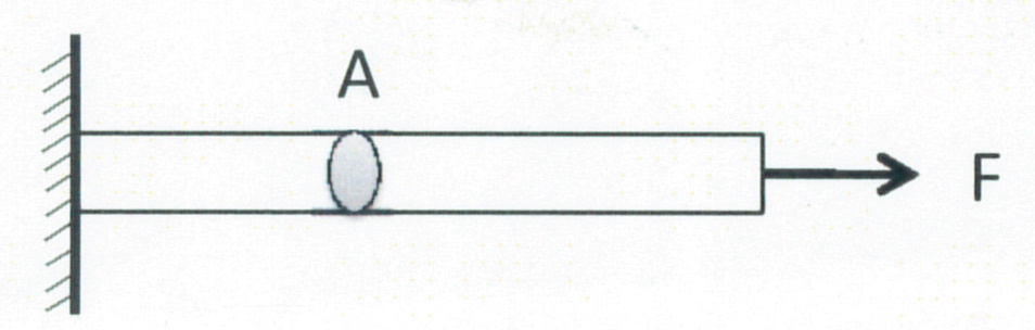 தகைவு (stress)